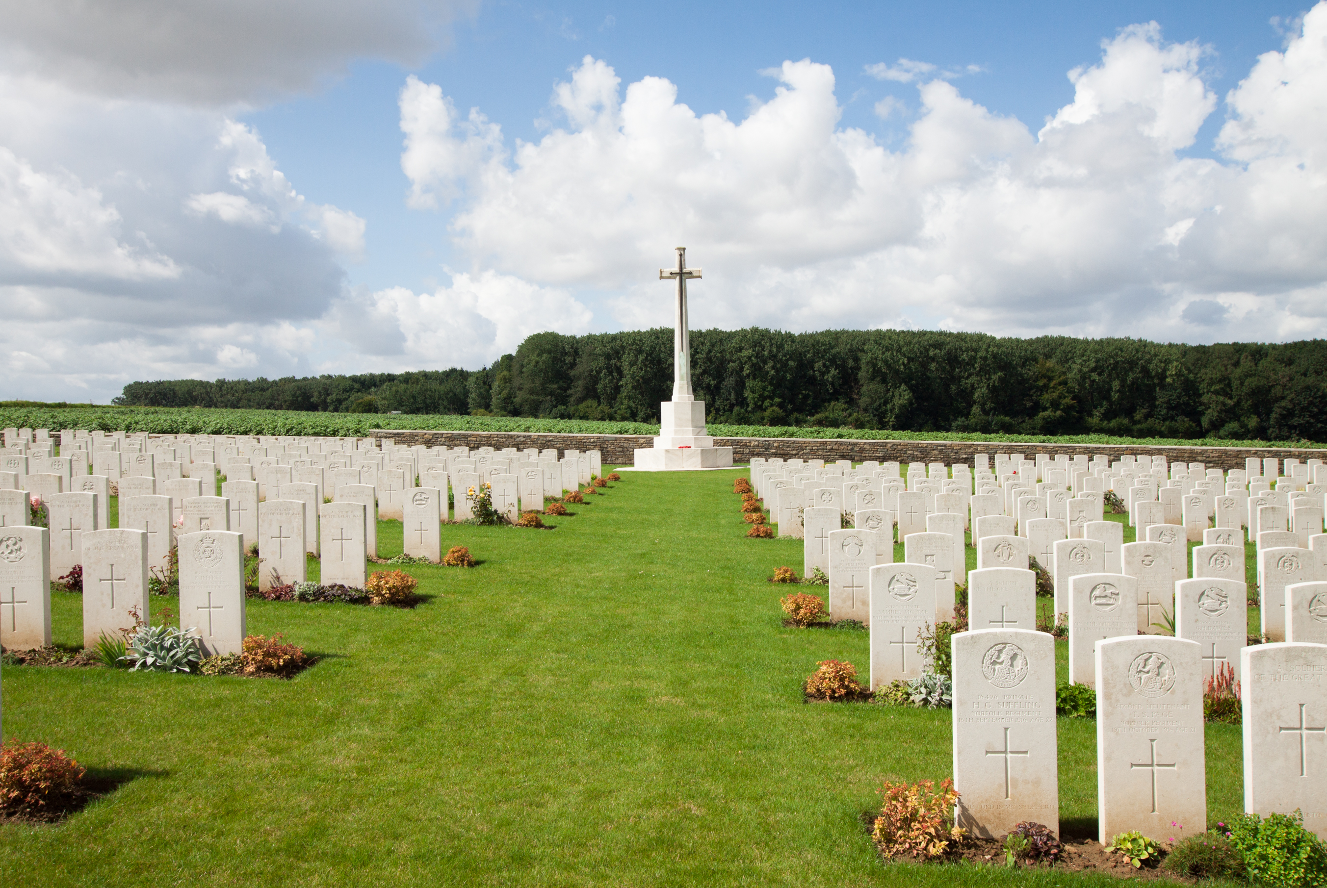 Guillemont Road Cemetery